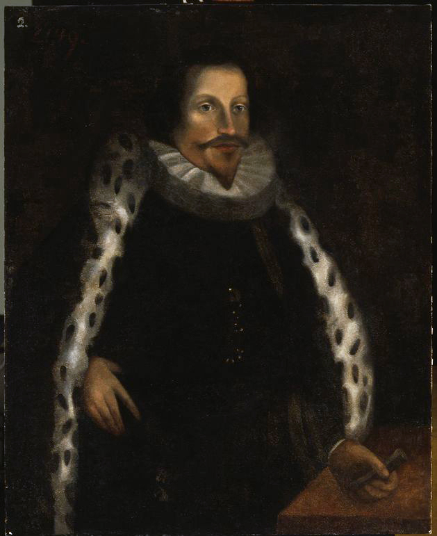 Беларуская (тарашкевіца): Партрэт Альбрэхта Станіслава Радзівіла (Albrecht Stanisłaŭ Radzivił).